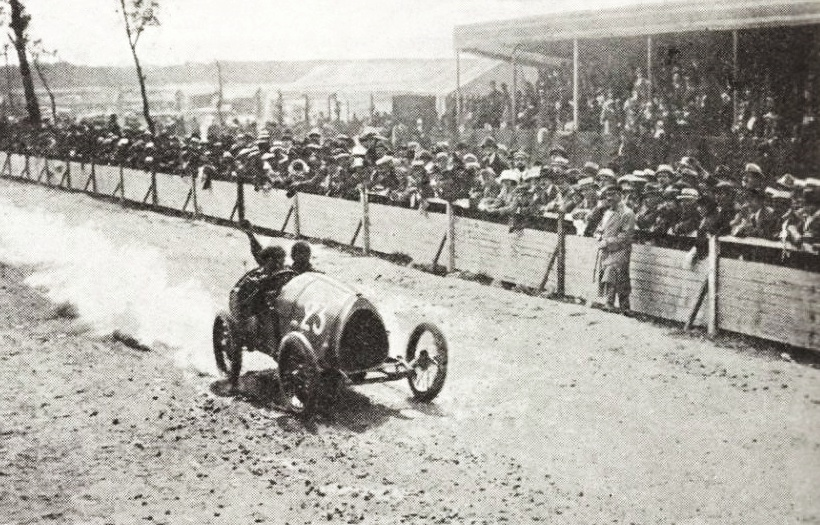 Ernest Friderich vainqueur de la Coupe des Voiturettes du Mans sur Bugatti en 1920 - La Vie au Grand Air, 20 septembre 1920, p.42